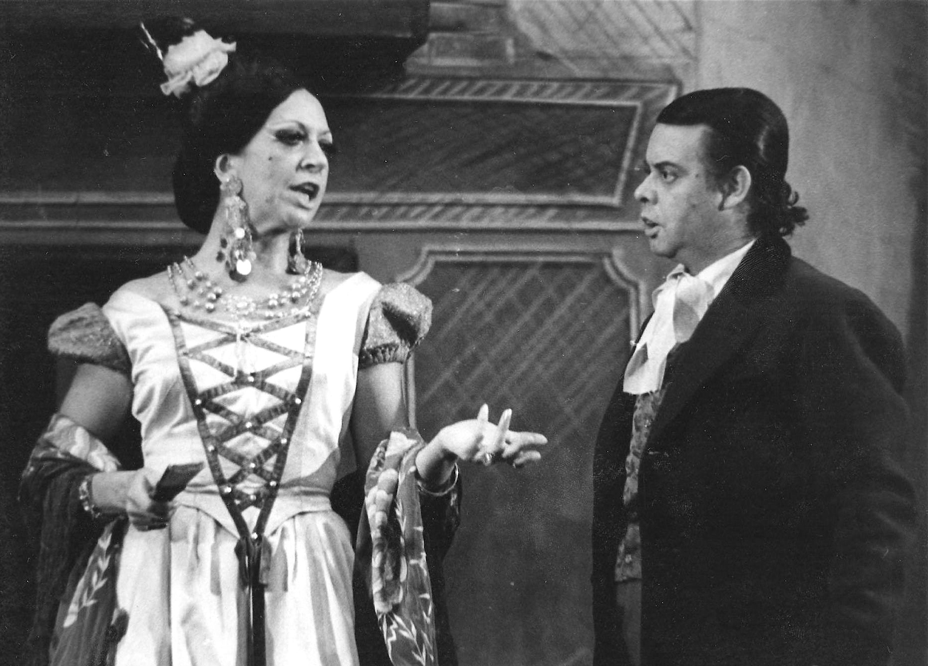 Marisol Lacalle como "Beltrana" y Segundo García como "Cardona" en la zarzuela Doña Francisquita. Madrid, Centro Cultural de la Villa (después Teatro Fernán Gómez).